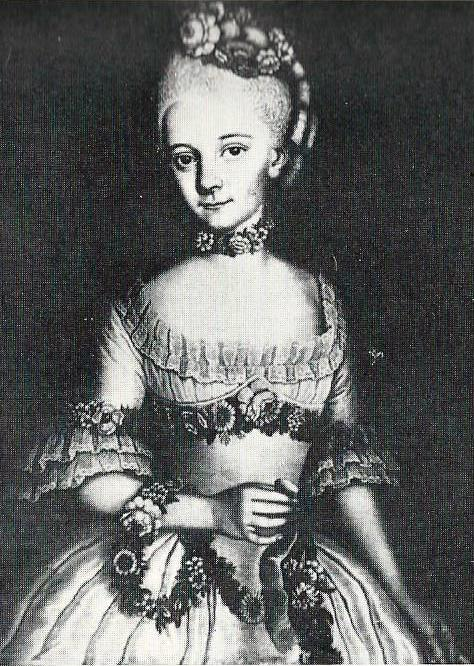 Anna Franziska Benda (1728 -1781), verheiratete Hattasch, Koloratursängerin und Gesangslehrerin in Gotha